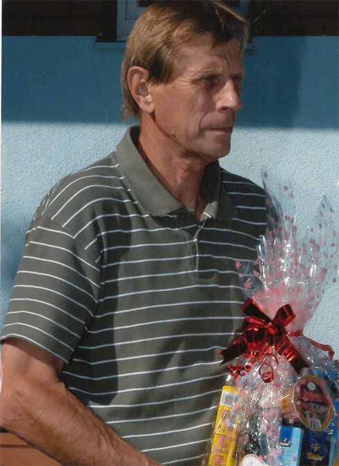 Vlastimil Hoferek